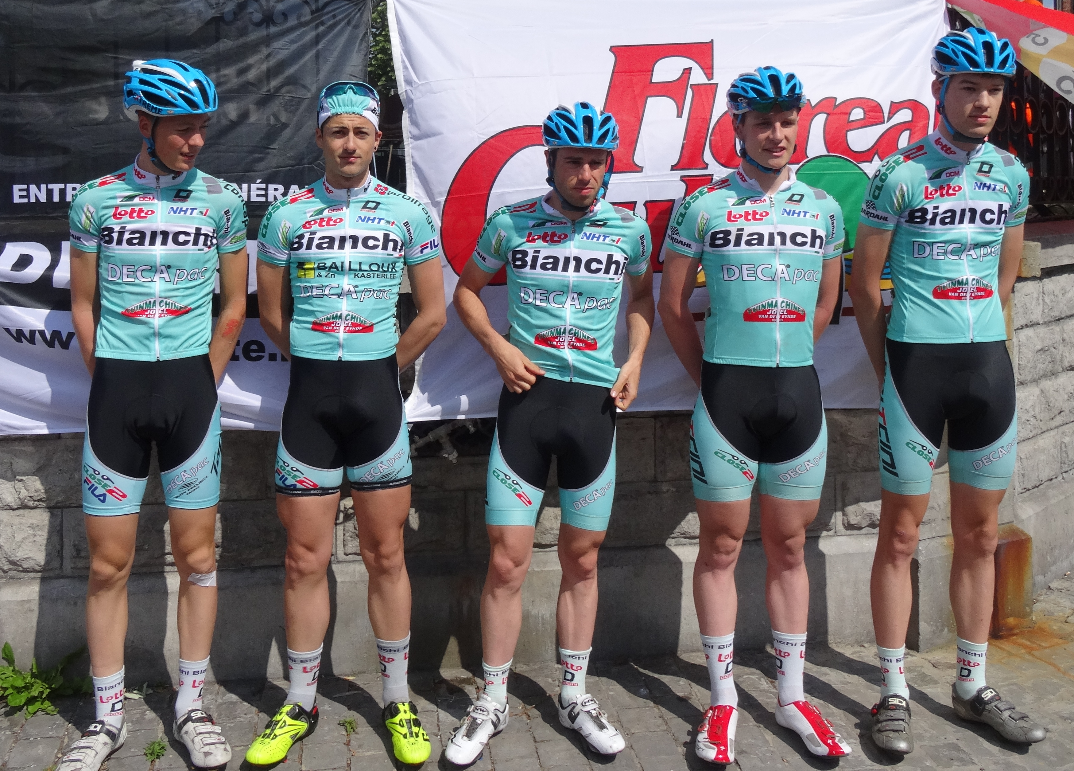 Reportage réalisé le samedi 17 mai à l'occasion du départ du Grand Prix Criquielion 2014 à Boussu, Belgique.